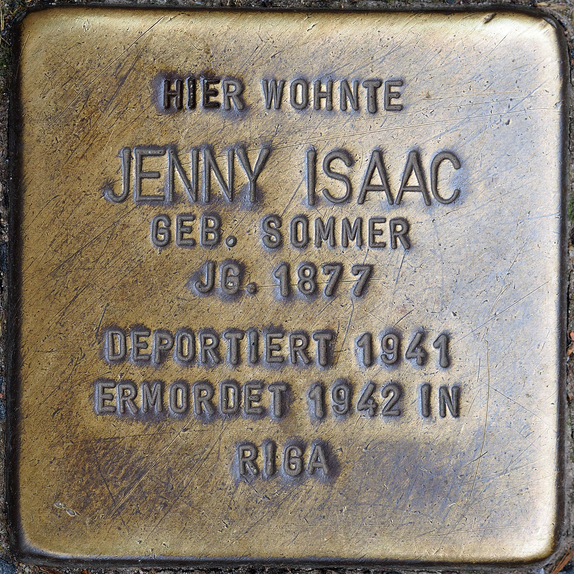 Stolpersteine MG: Isaac, Jenny